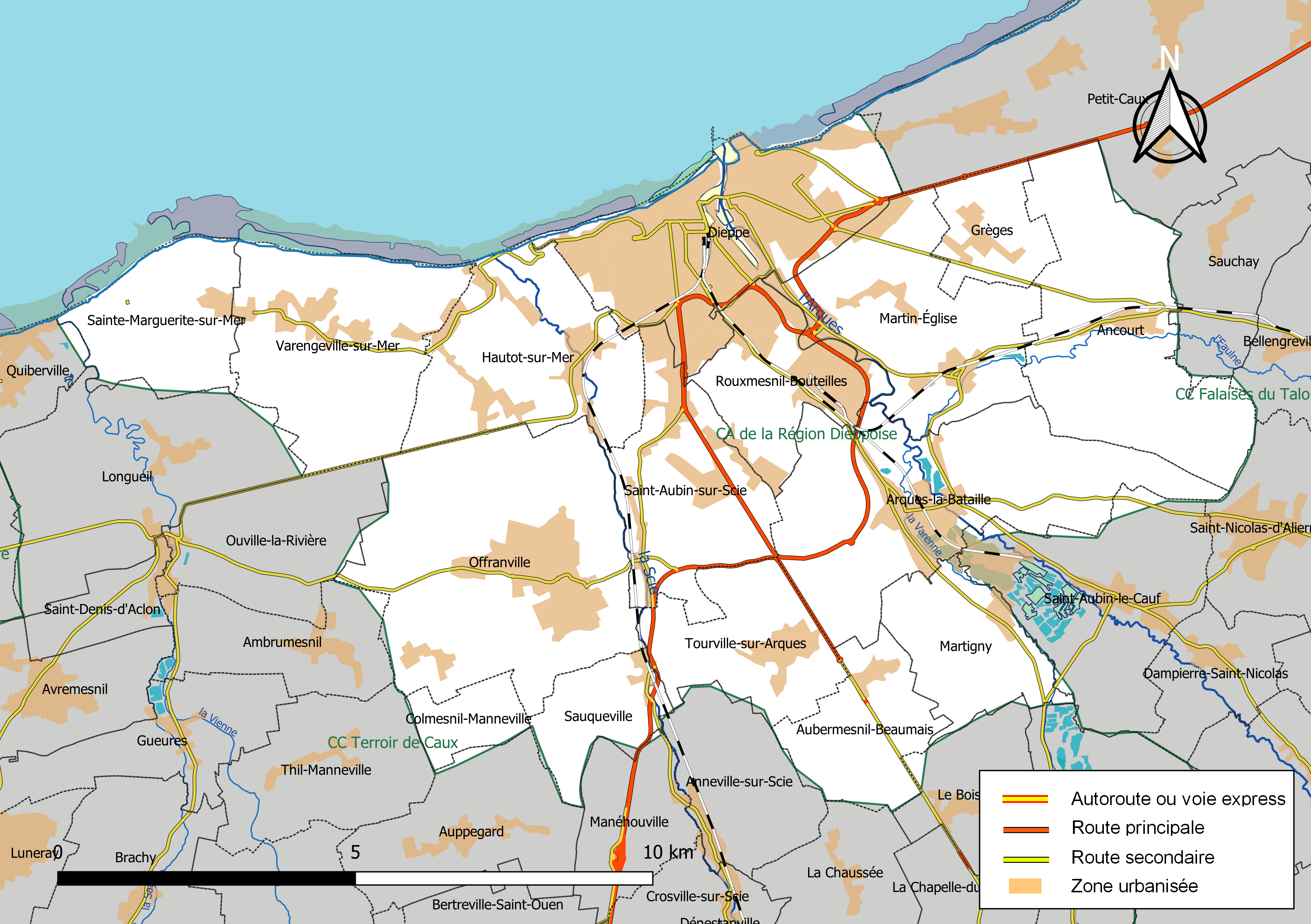 Carte géographique de la Communauté d'agglomération de la Région Dieppoise, département de la Seine-Maritime, France. Composition au 1er janvier 2019.